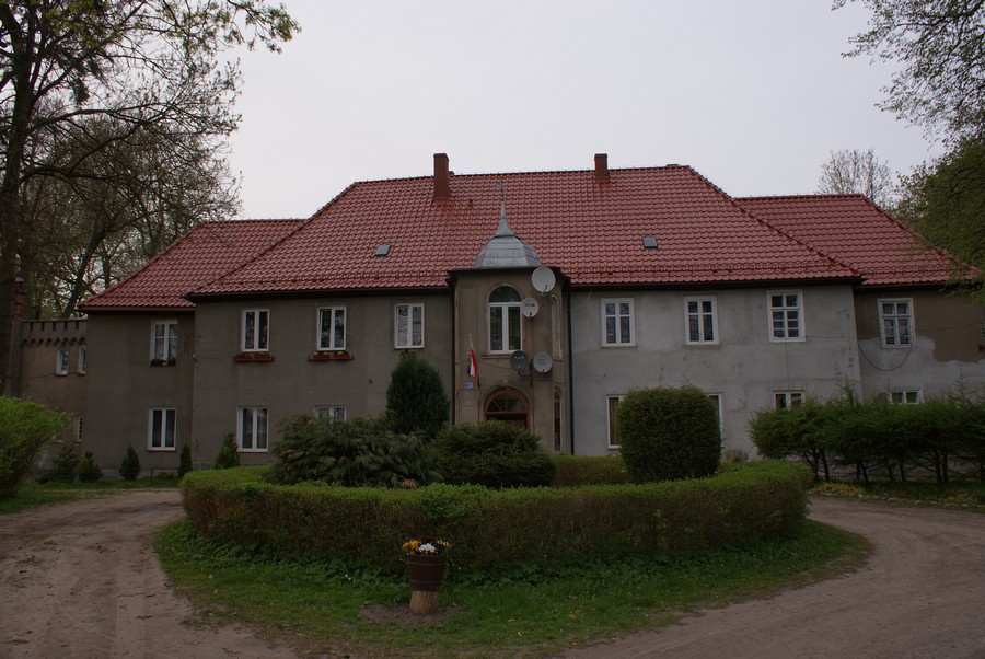 Dwór w Kołaczu